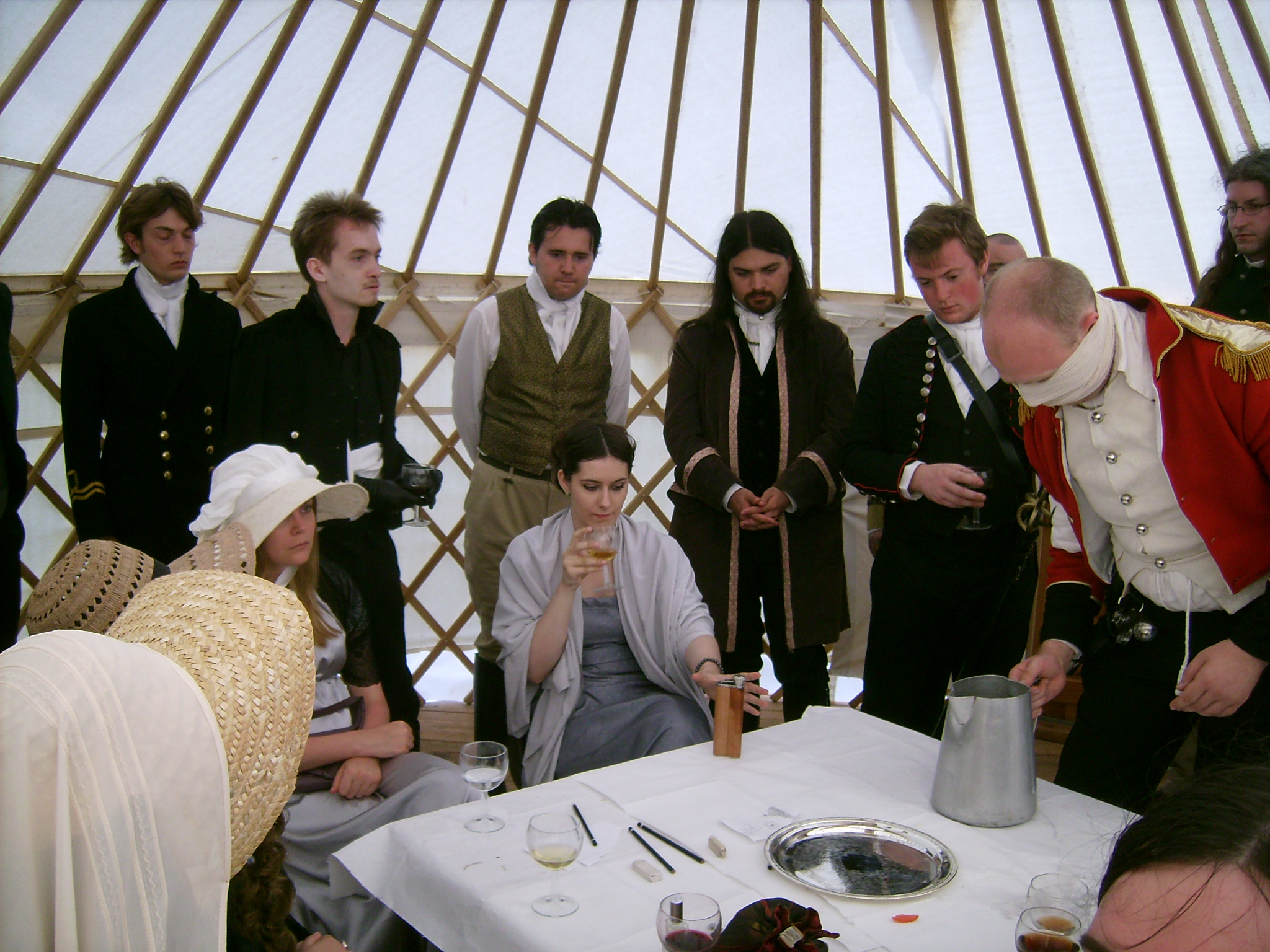 Aliens & Alienation, aka Jane Austen's Aliens. The first Masquerades & Massacres event.